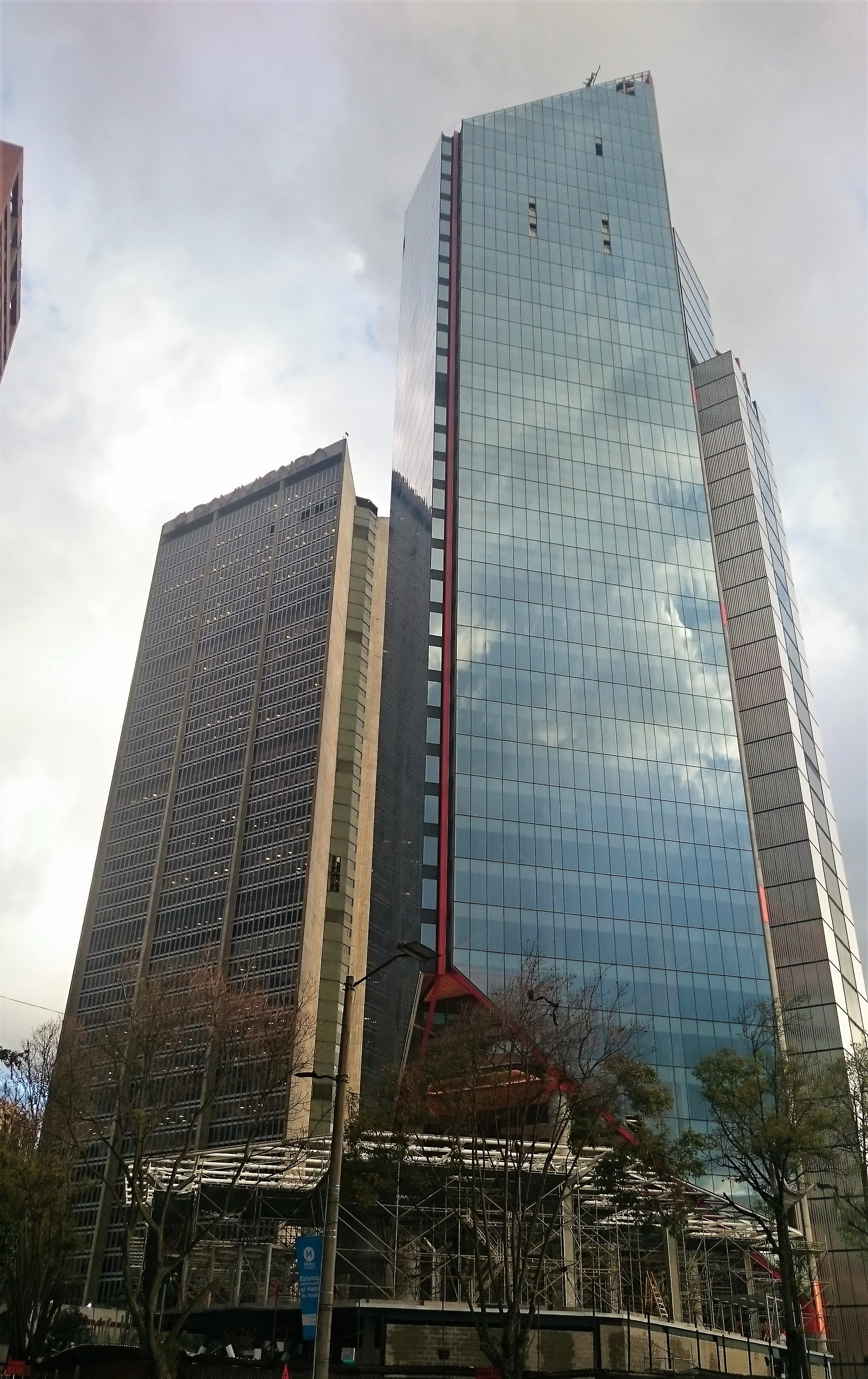 Atrio 25 de abril de 2019